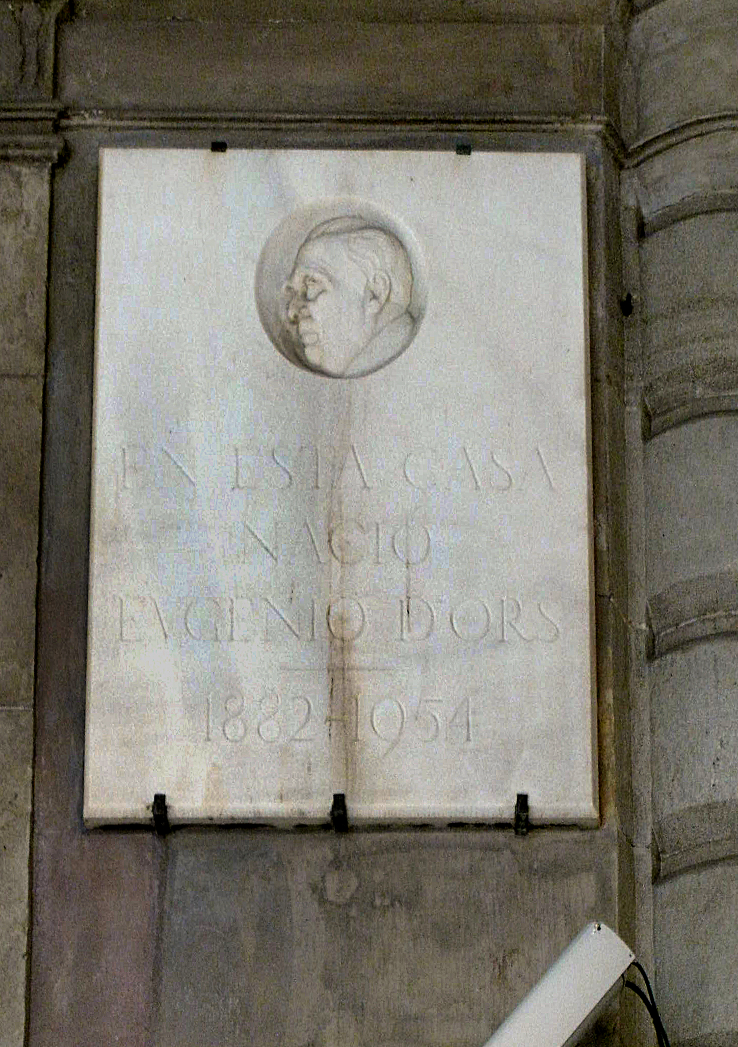 Eugeni D'Ors. C. Comtal, 2 (Barcelona)